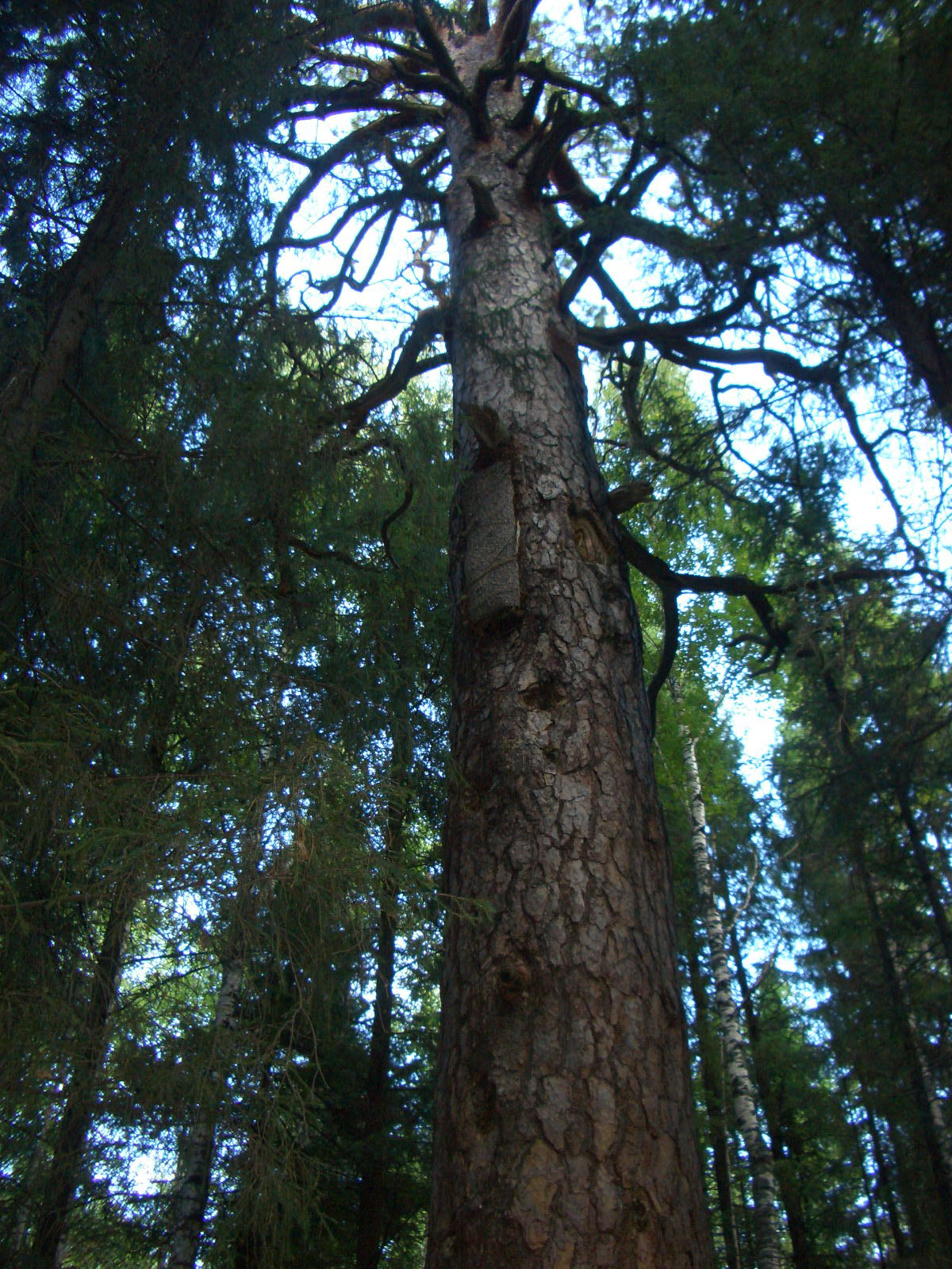 Борть, то есть улей для диких пчёл, устроенный в дупле дерева. Природный парк "Оленьи Ручьи", Свердловская область, 2005 год.